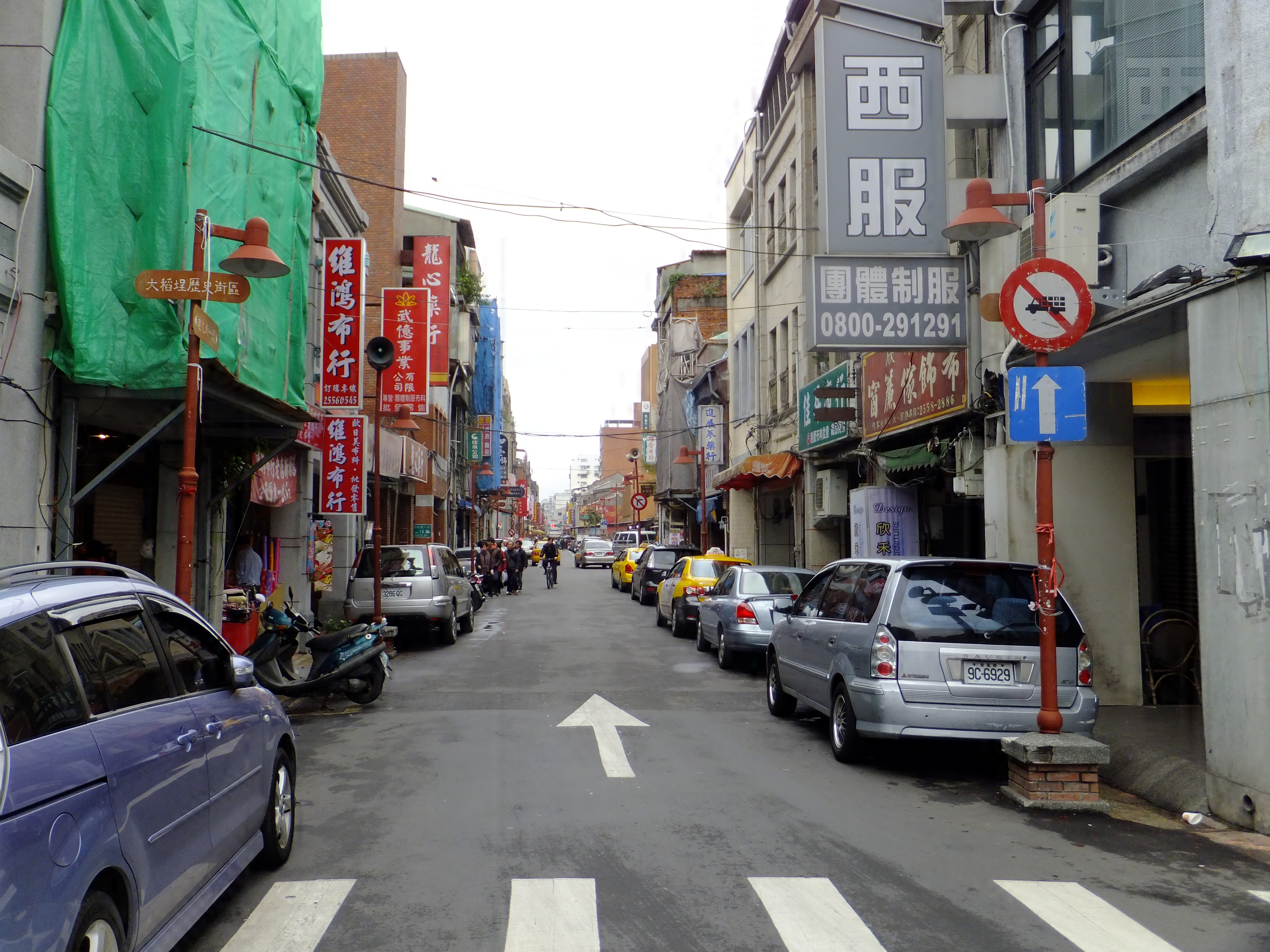 迪化街一段與南京西路路口，大稻埕歷史街區的起點。